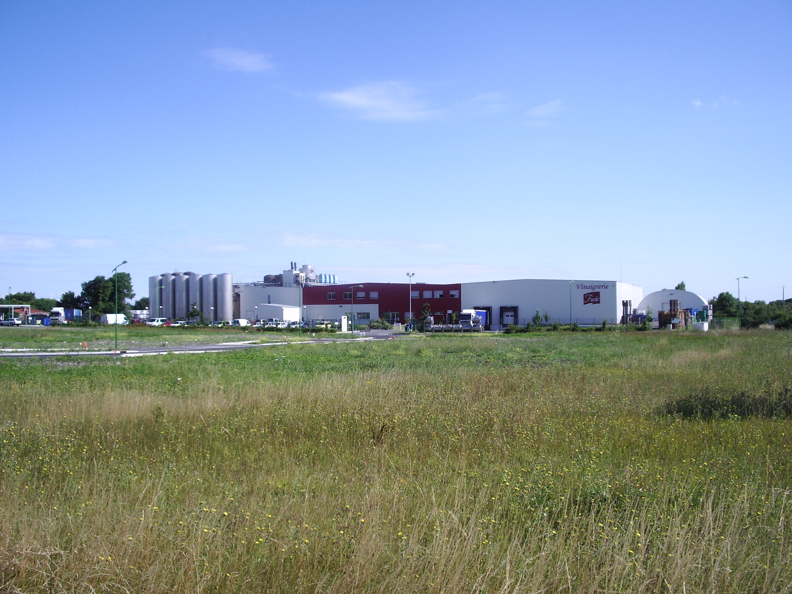 Vinaigrerie de La Tremblade, Charente-Maritime, France.